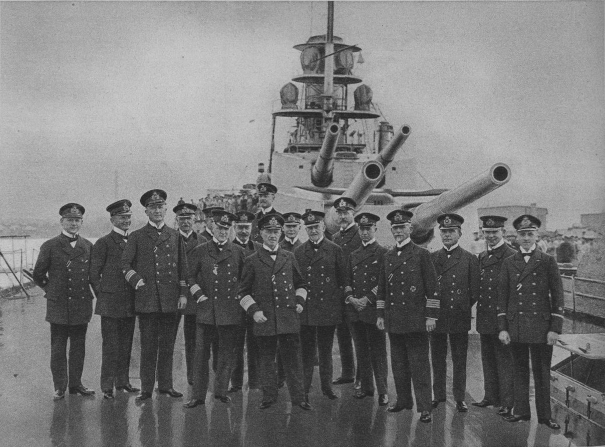 l'amiral Scheer en 1916 avec son état-major, il est au centre.